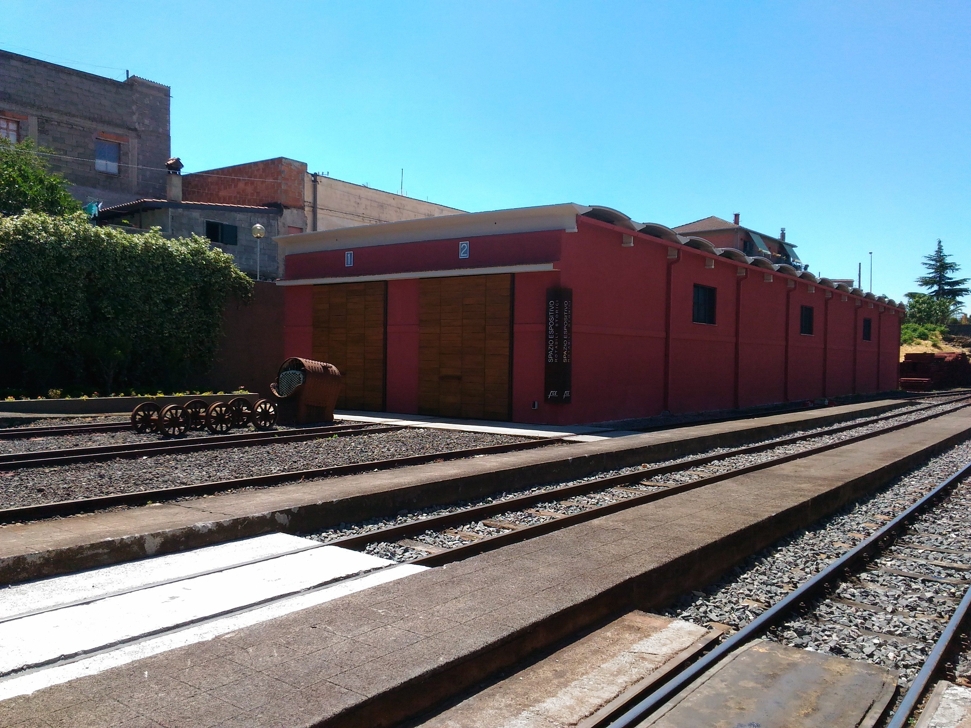 Vista dall'esterno dello spazio espositivo dei rotabili storici, (ex deposito locomotive di Bronte). Fra il binario 1 ed il binario 2 di quest'ultimo, vi è una vecchia caldaia di una vecchia locomotiva a vapore FCE ormai demolita, con tre assi.